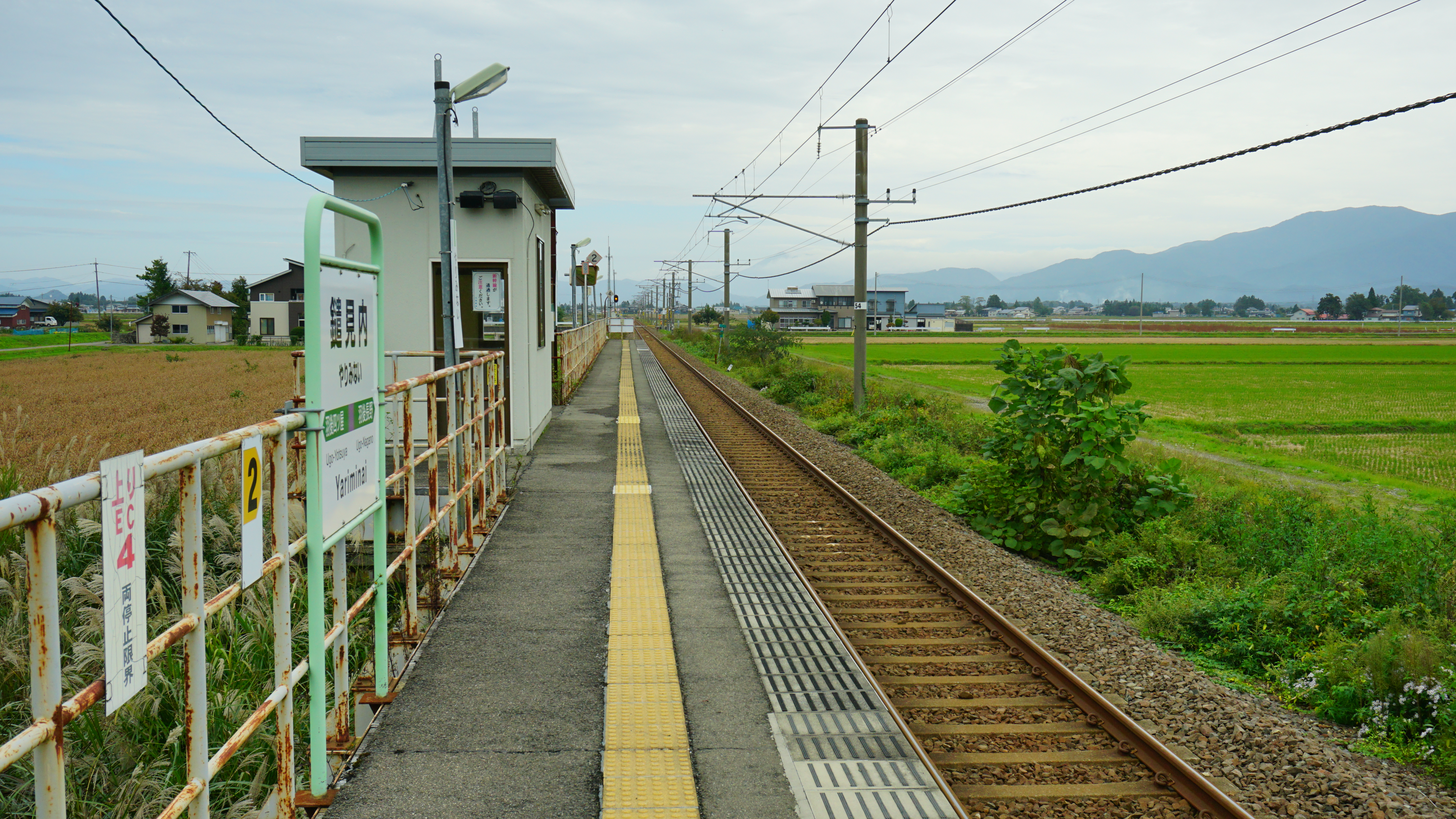 田沢湖線 鑓見内駅（秋田県大仙市）